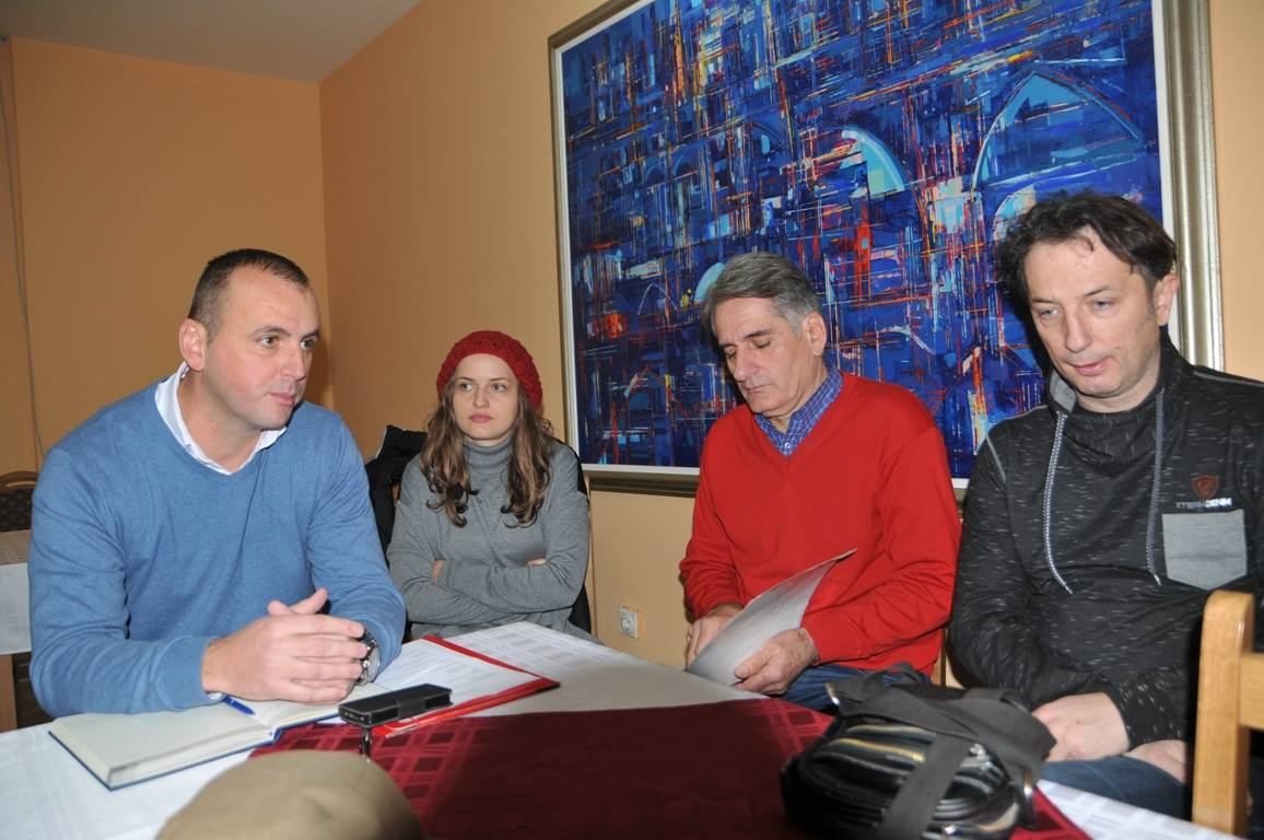 Оснивање фото клуб "Вишеград"